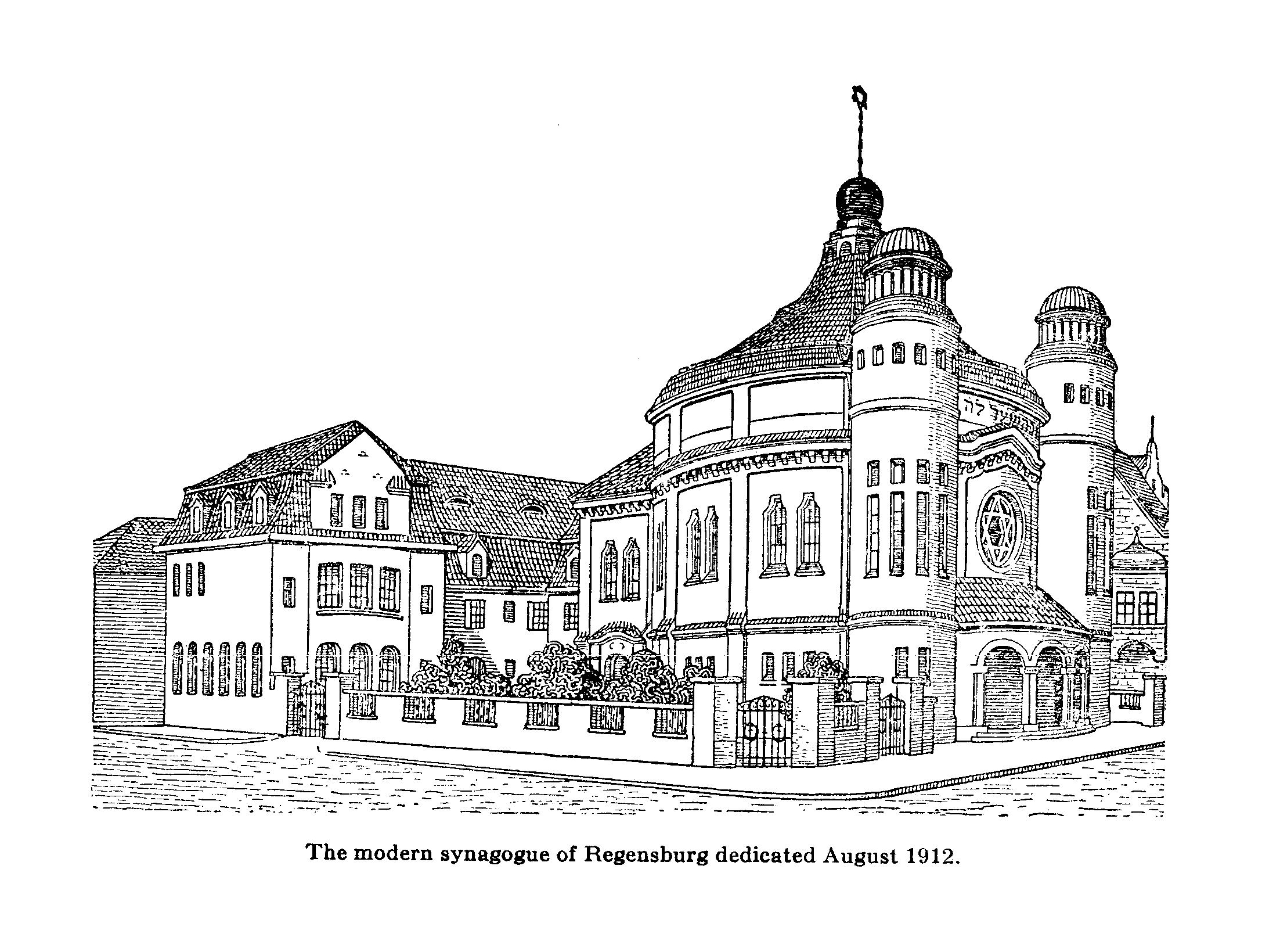 Neue Synagoge Am Brixenhof , früher Schäffnerstrasse . Eingeweiht 1912